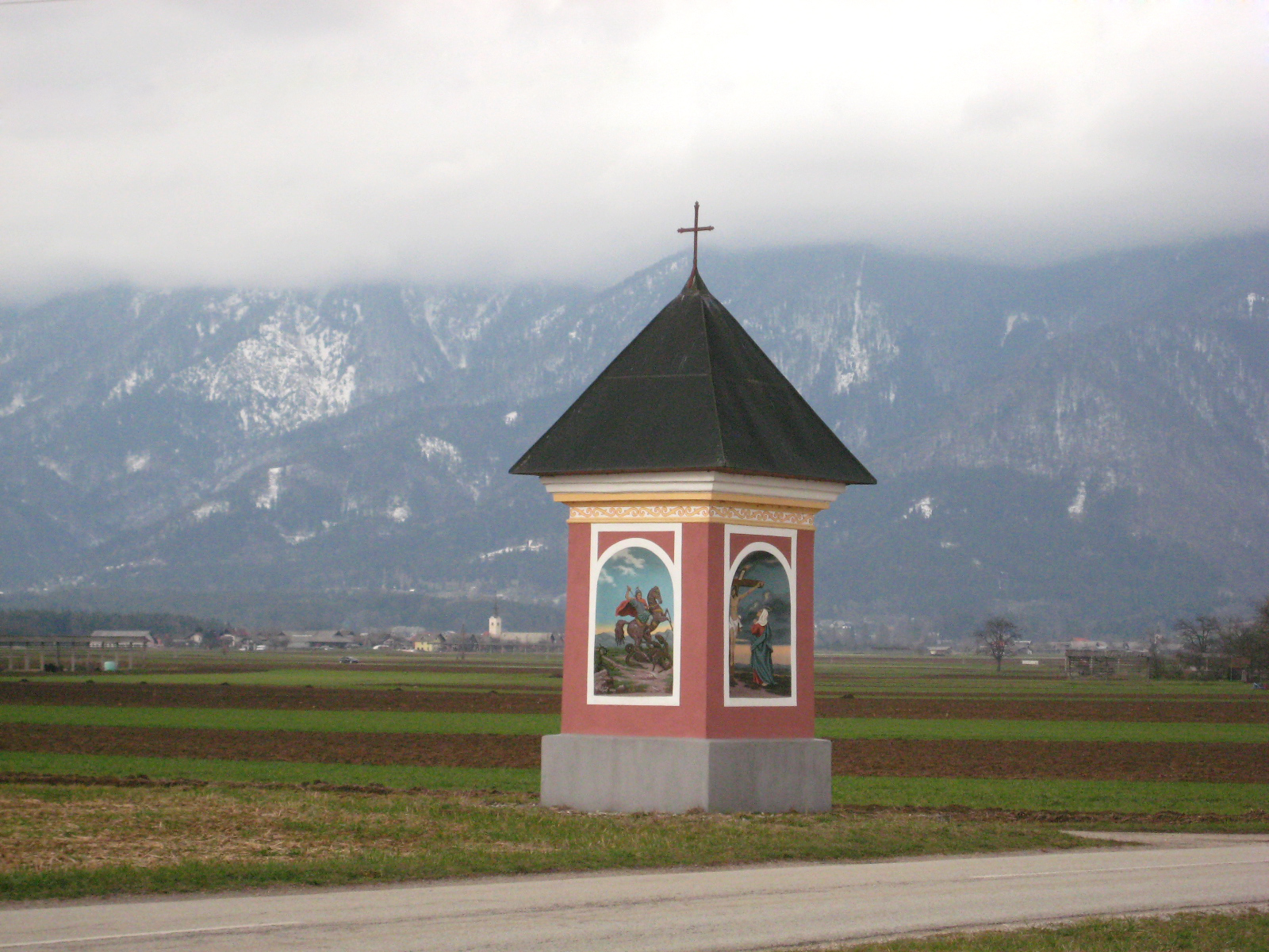 Luže, Gorenjska (Slovenia)